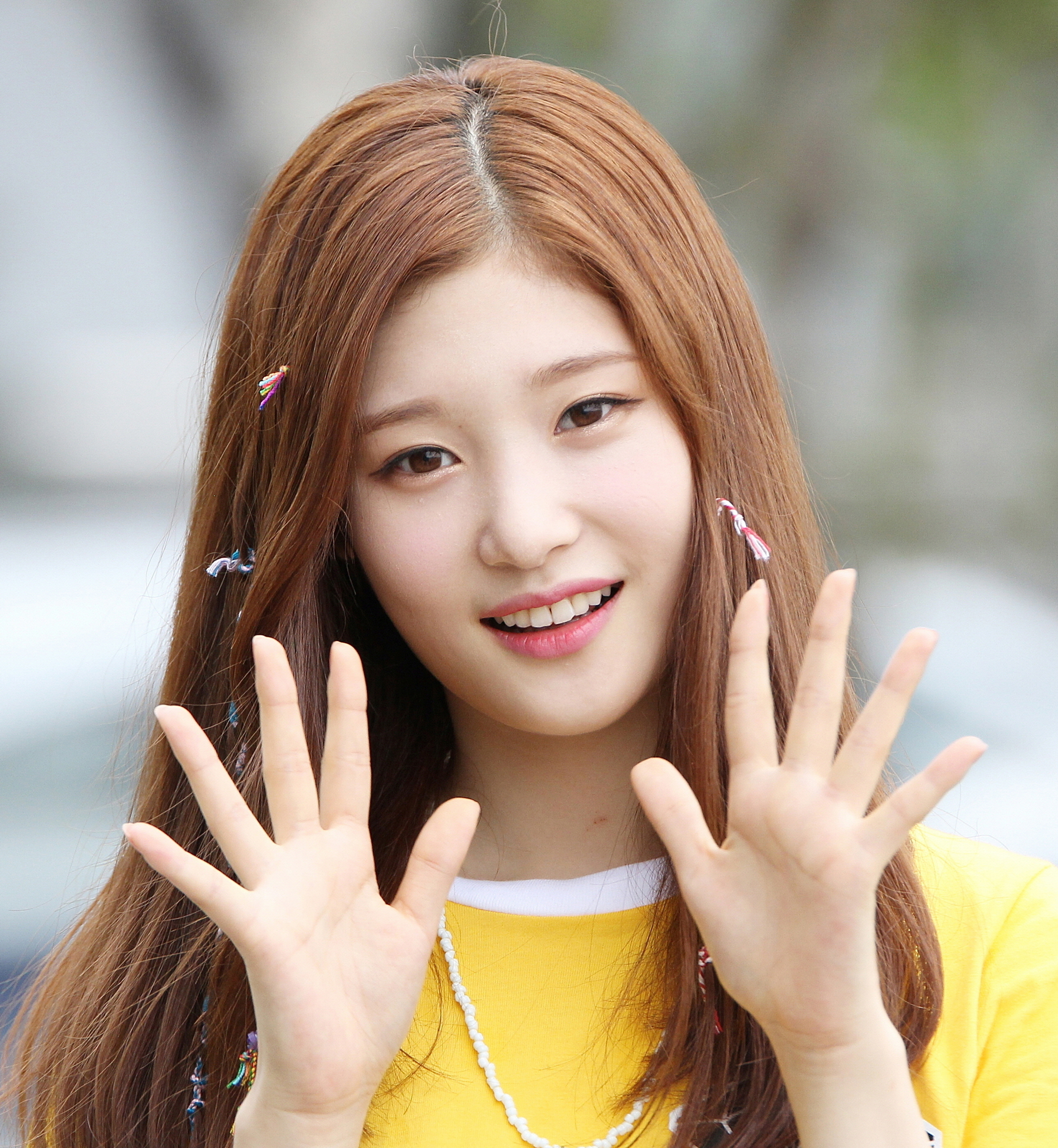 150929 다이아 (채연) - SBS 더쇼 팬미팅 DIA (Chaeyeon) - SBS the show fanmeeting